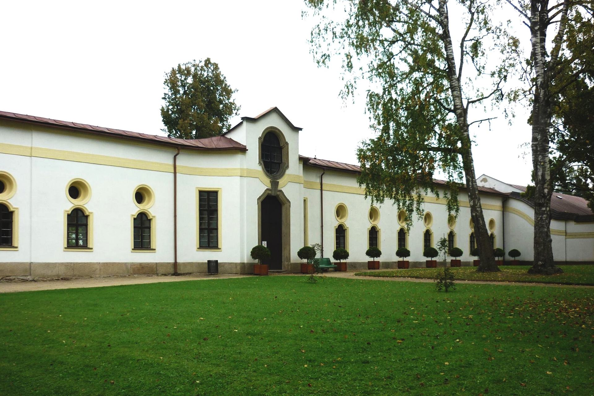 Zámek ve Žďáru nad Sázavou